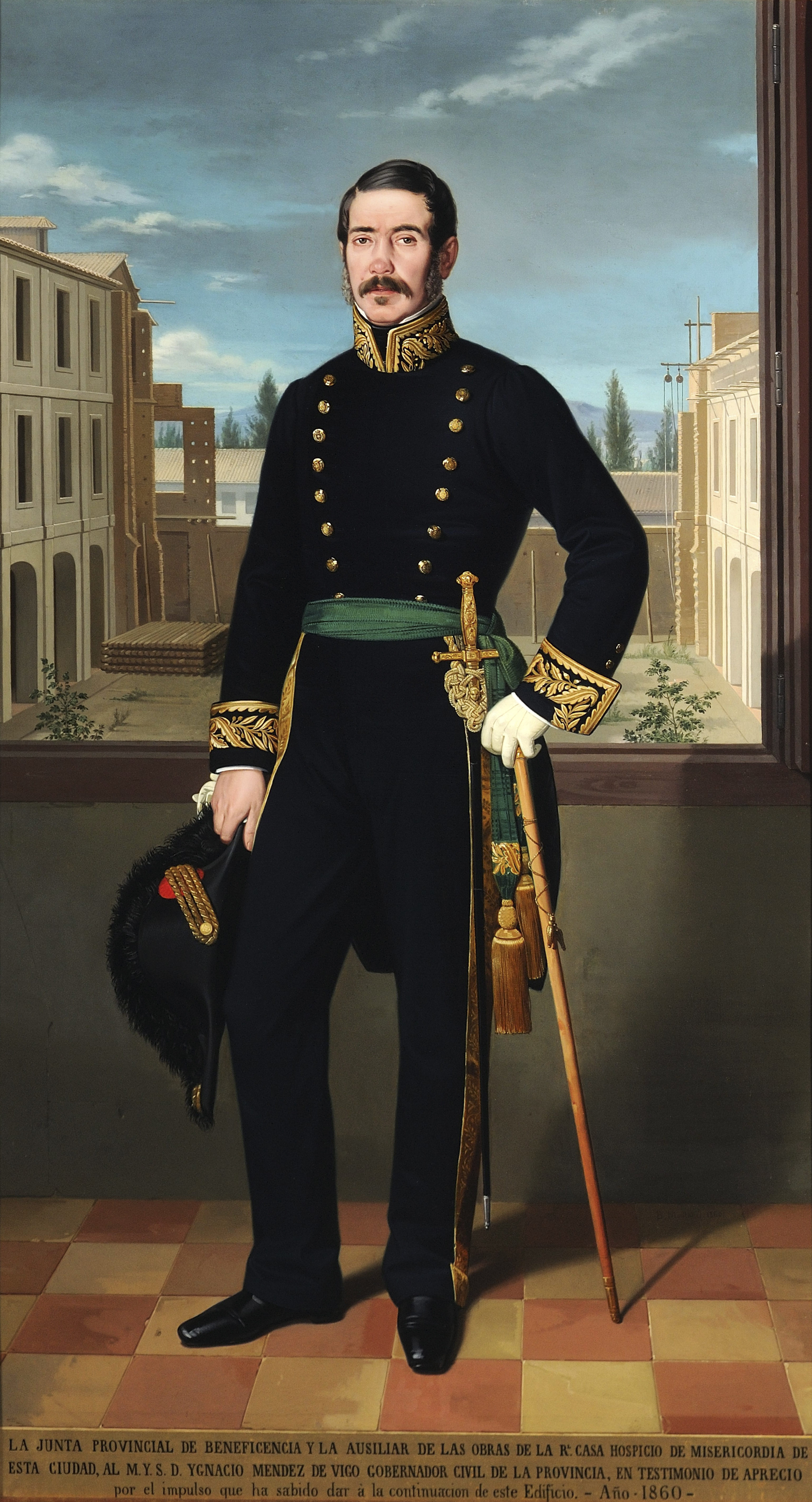 Retrato del político español Ignacio Méndez de Vigo y Valdés Miranda, que llegó a ser gobernador civil de Zaragoza y presidente de la Diputación Provincial de Zaragoza.